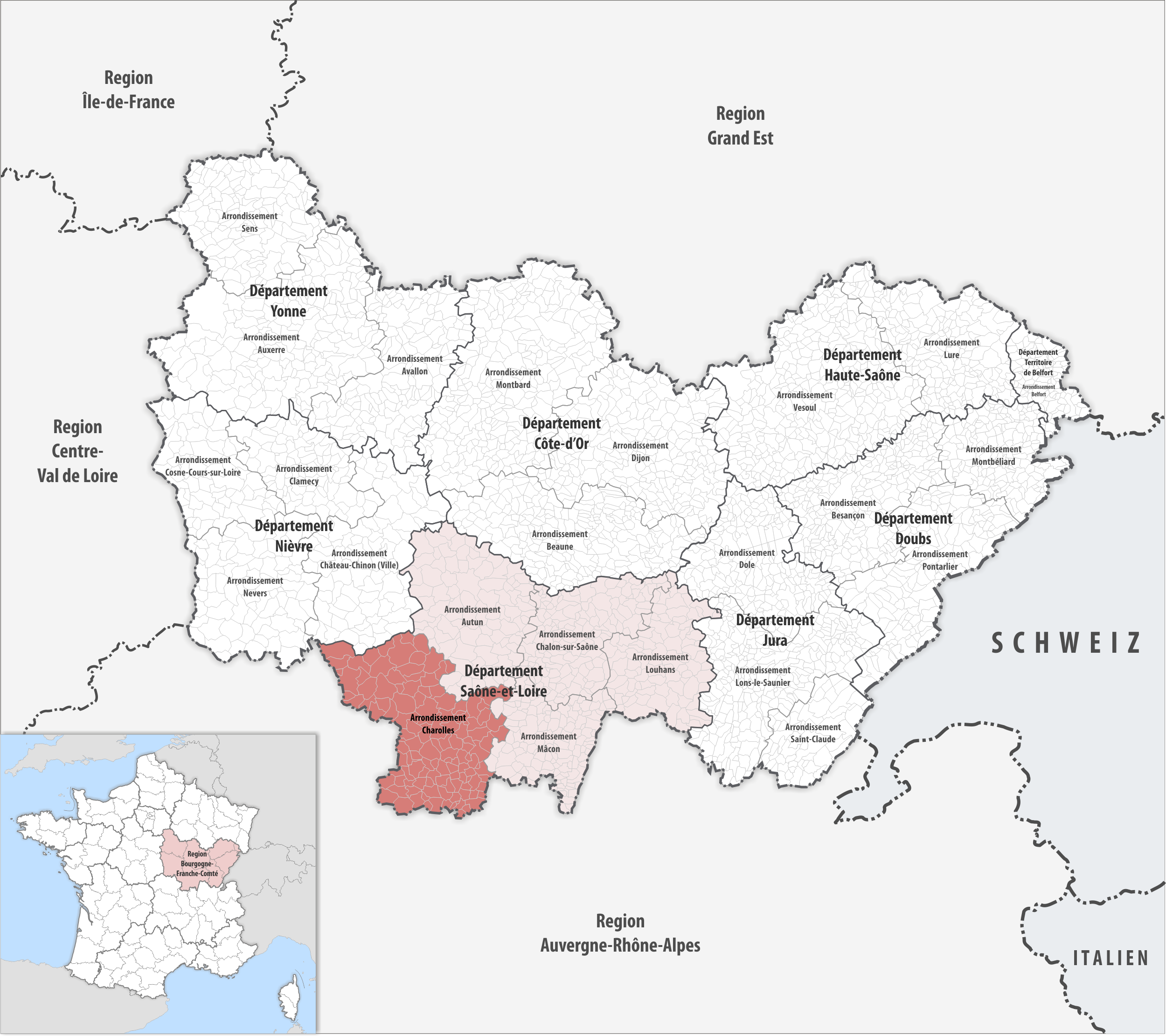 Lage des Arrondissements Charolles